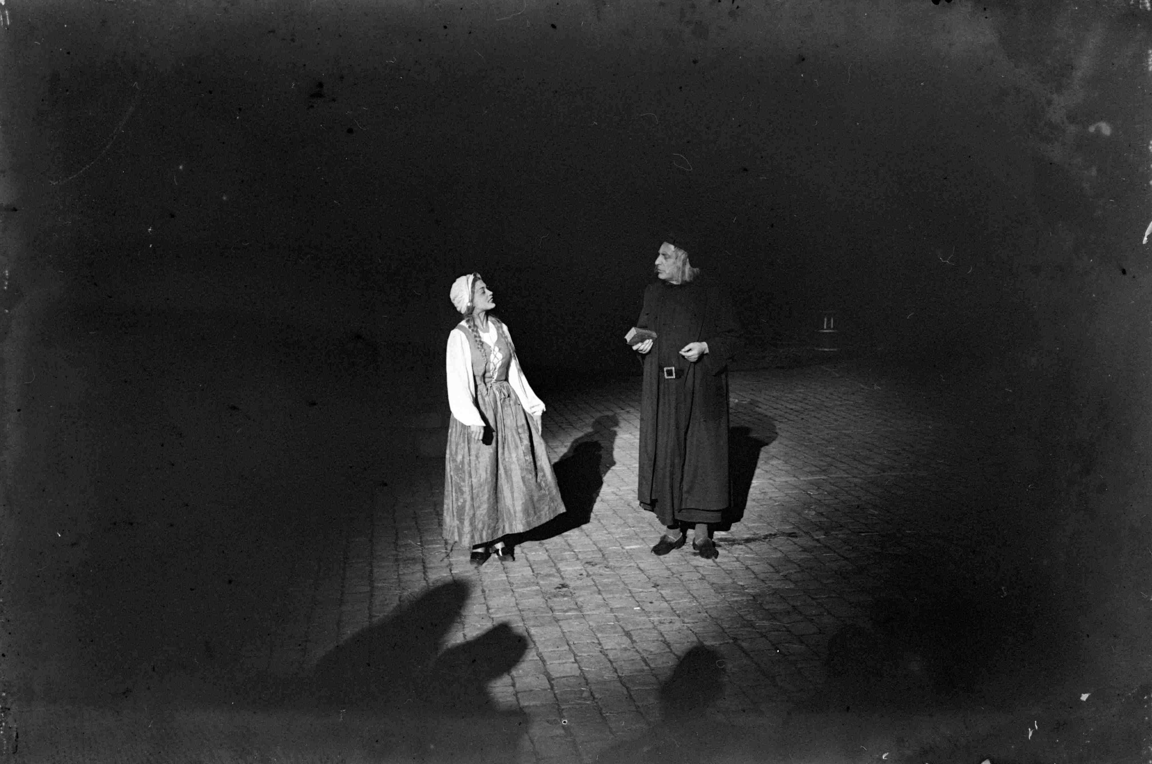 Middeleeuwse toneelspel Mariken van Nieumeghen